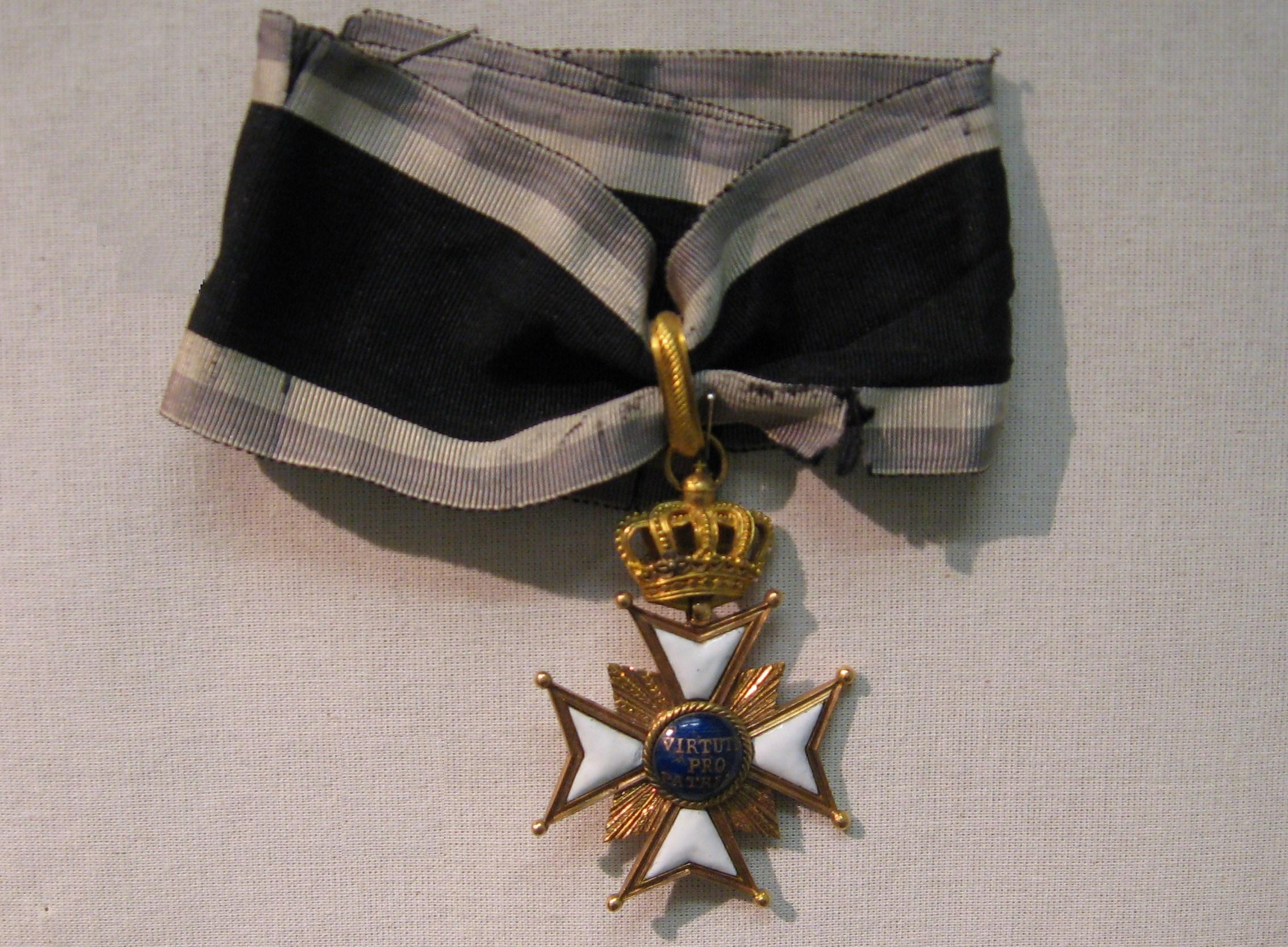 Militär-Max-Joseph-Orden: Großkreuz, Halsdekoration